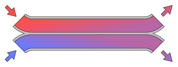 Figur på en medflödes värmeväxlare Skapad av: Daniel Ryde, 2004-11-12 Licens: GFDL